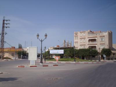 Photo de la ville de Zéramdine (Tunisie)